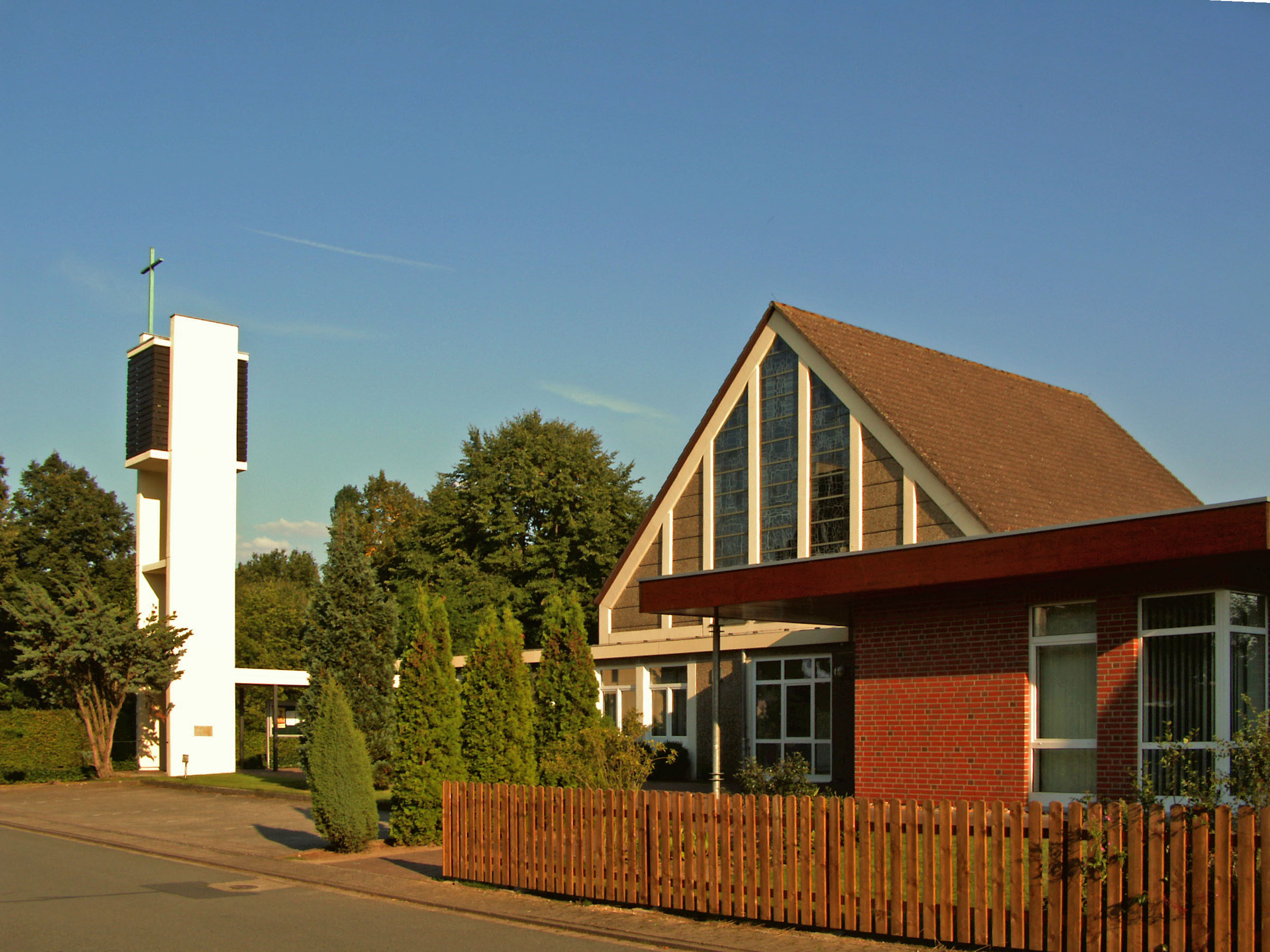 Katholische Kirche St. Andreas in Meine, Landkreis Gifhorn